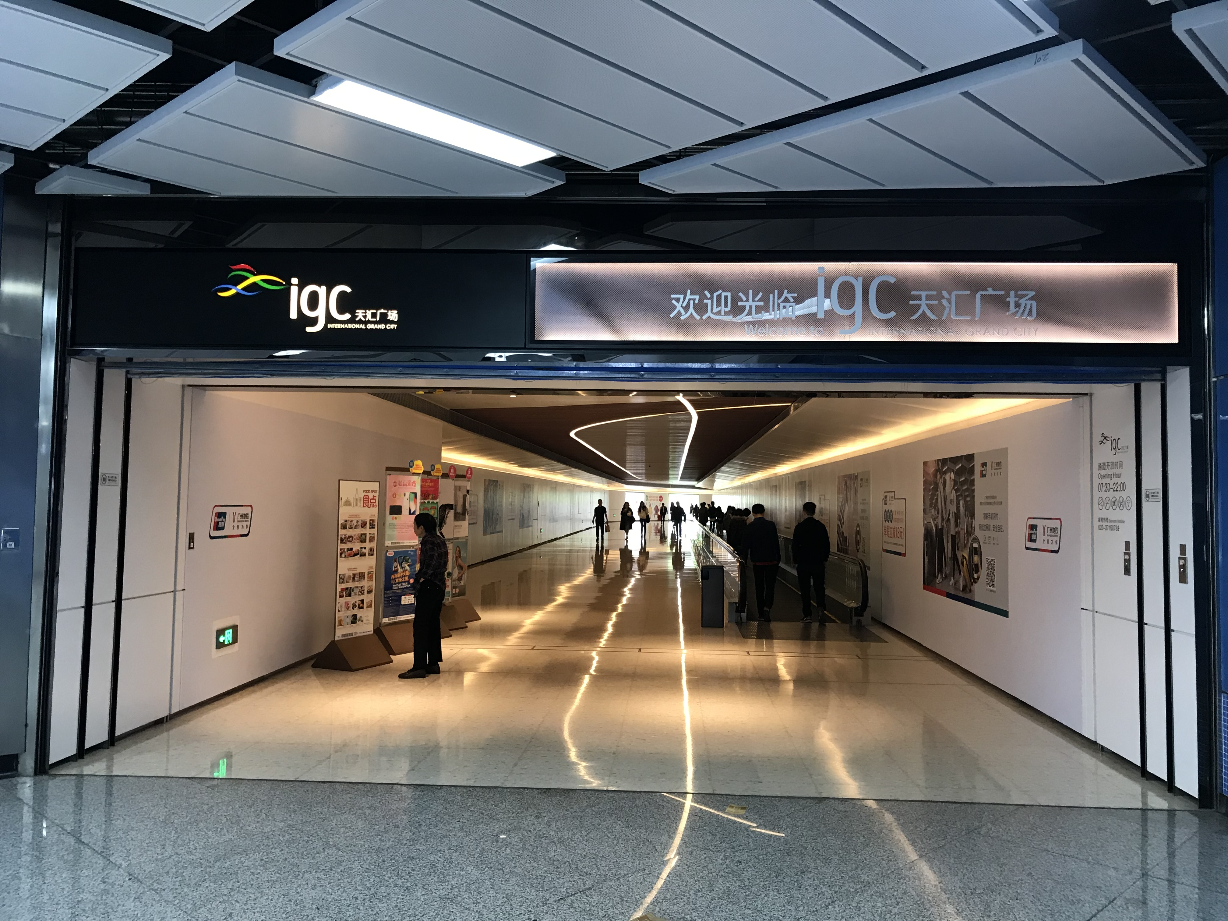 广州地铁猎德站